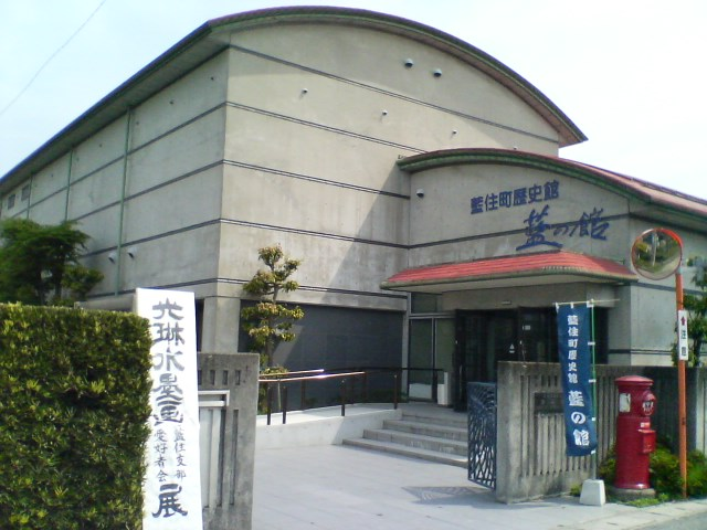 Ai no Yakata (Indigo Dyeing Museum), Aizumi town, Tokushima pref., Japan